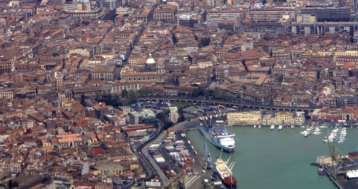 Particolare di Foto caricata su Commons-File:Cataniavistaarea.jpg